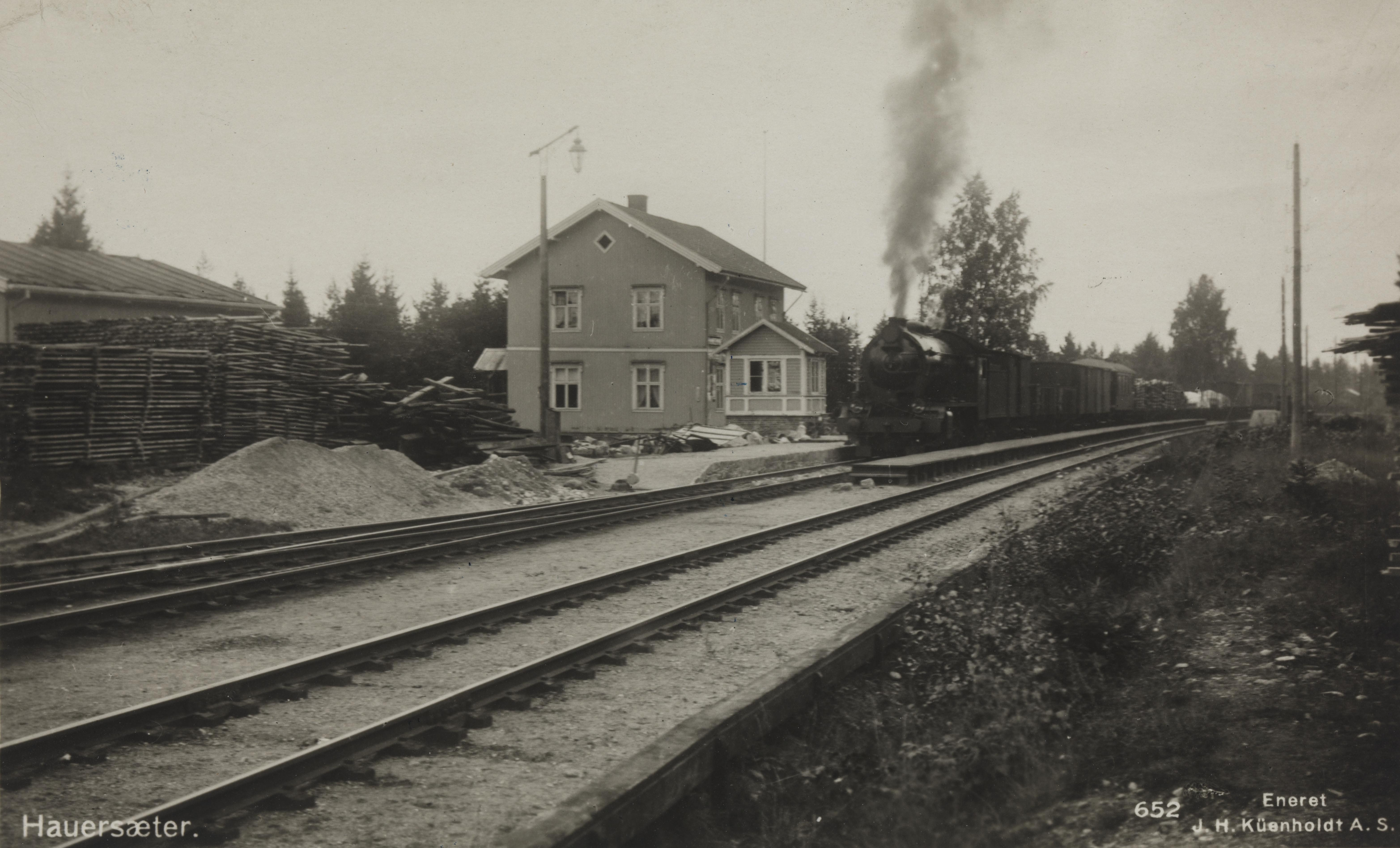 Bildet er hentet fra Nasjonalbibliotekets bildesamling Hauersæter,Hauersæter stasjon, Ullensaker, Akershus